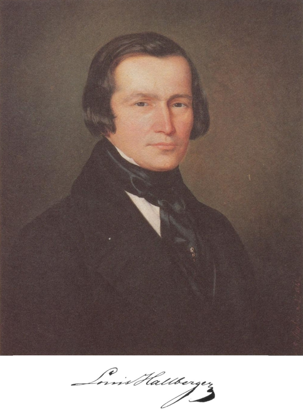 Porträt von Louis Hallberger, Gemälde von Michaël Stapleaux, 1844.